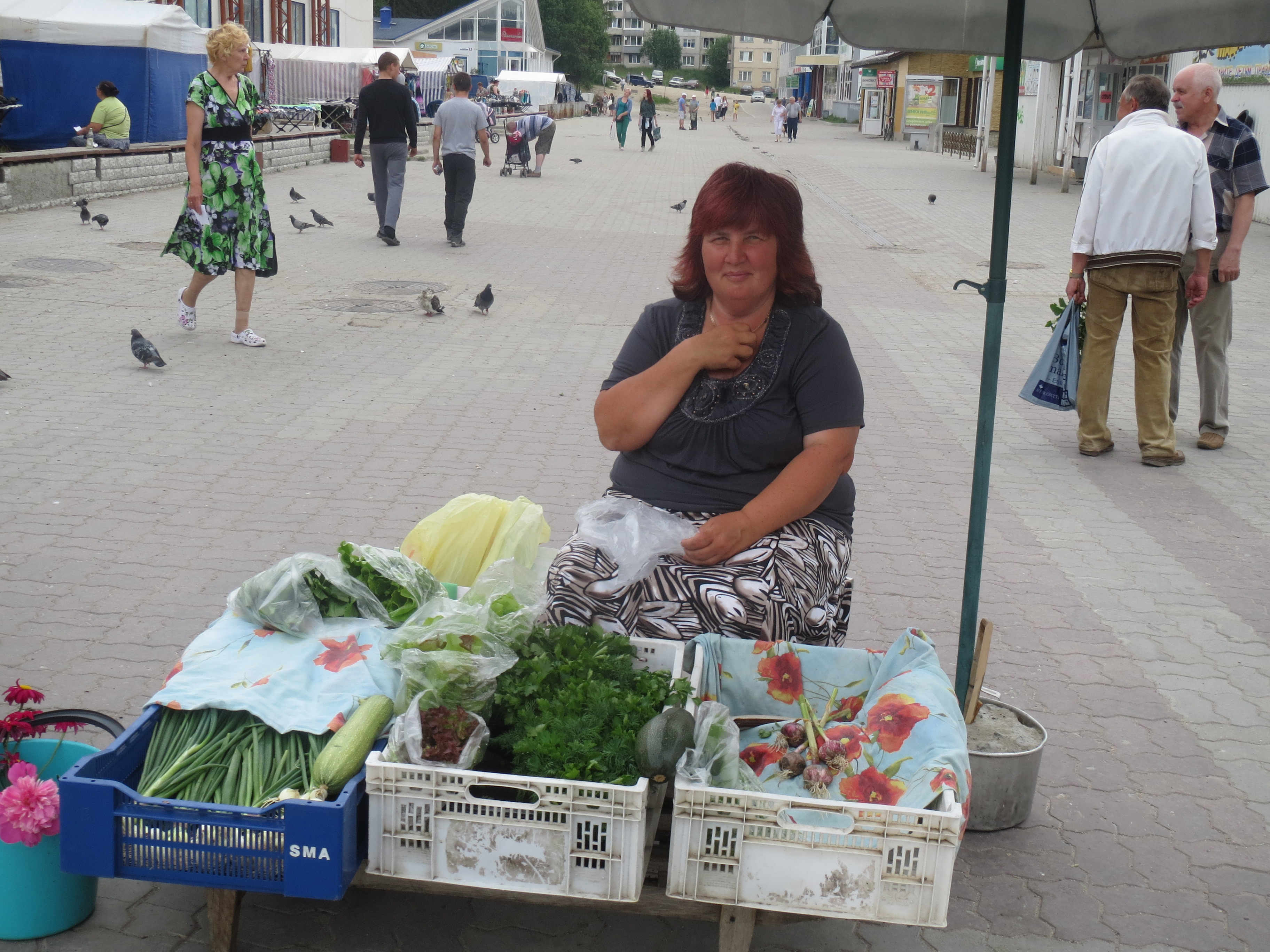 Kostamuksen torilta